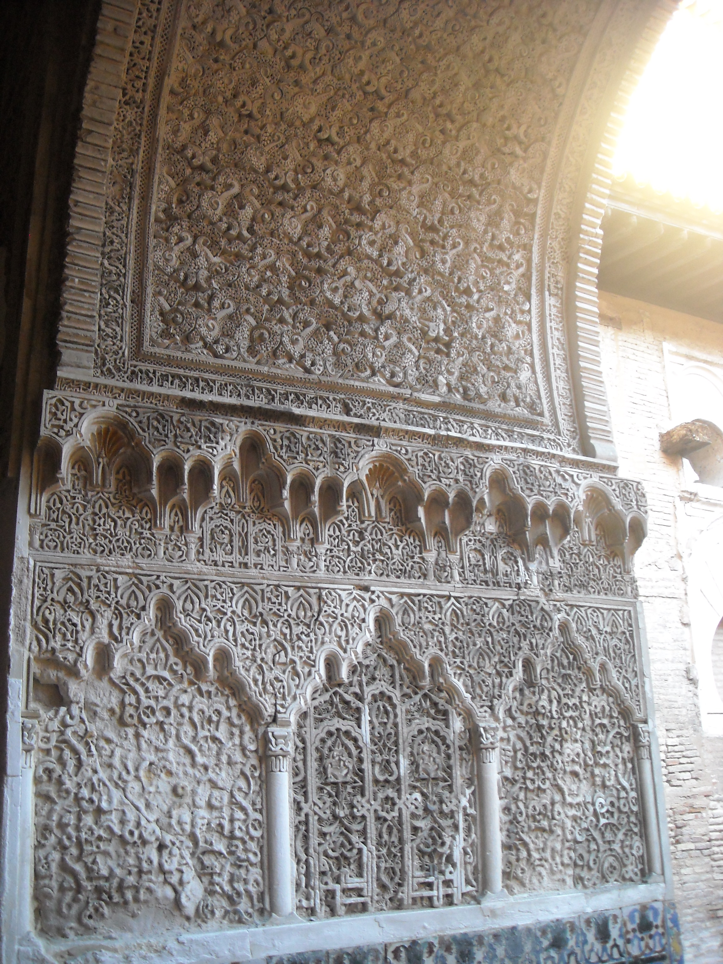 Detalle de los Reales Alcázares de Sevilla, en España.